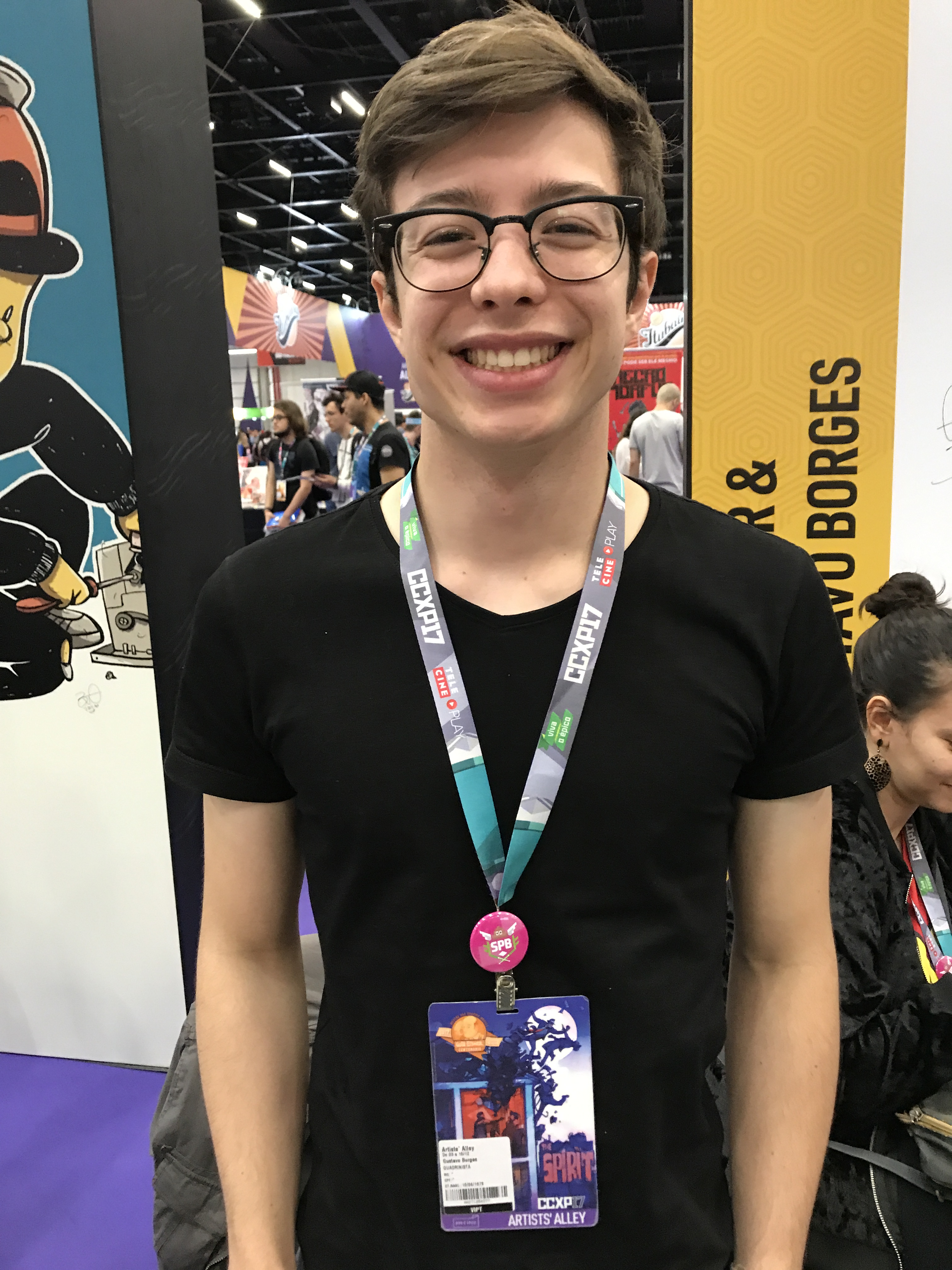 Artista Gustavo Borges na edição de 2017 da Comic Con Experience